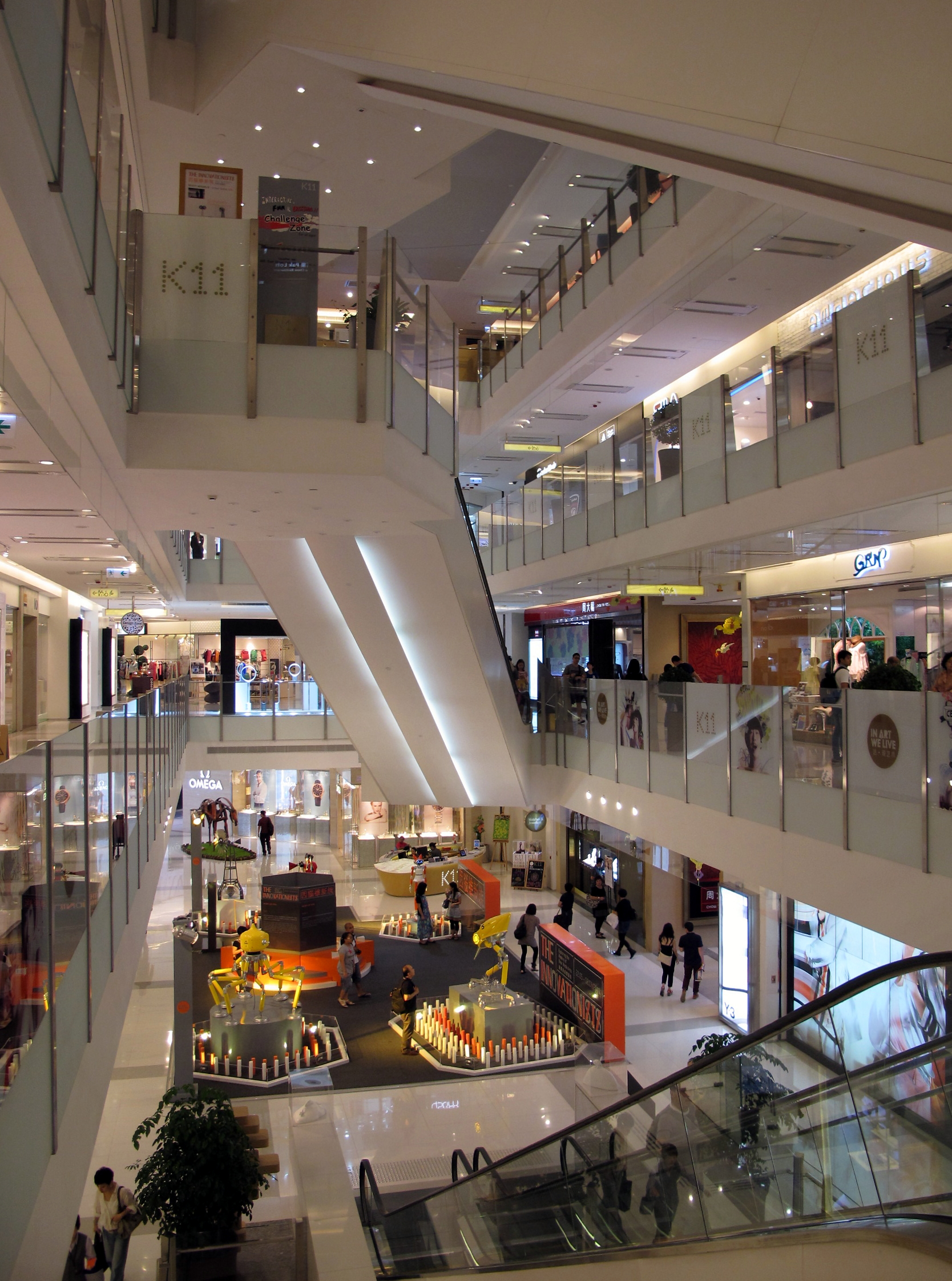 K11 Hong Kong Atrium